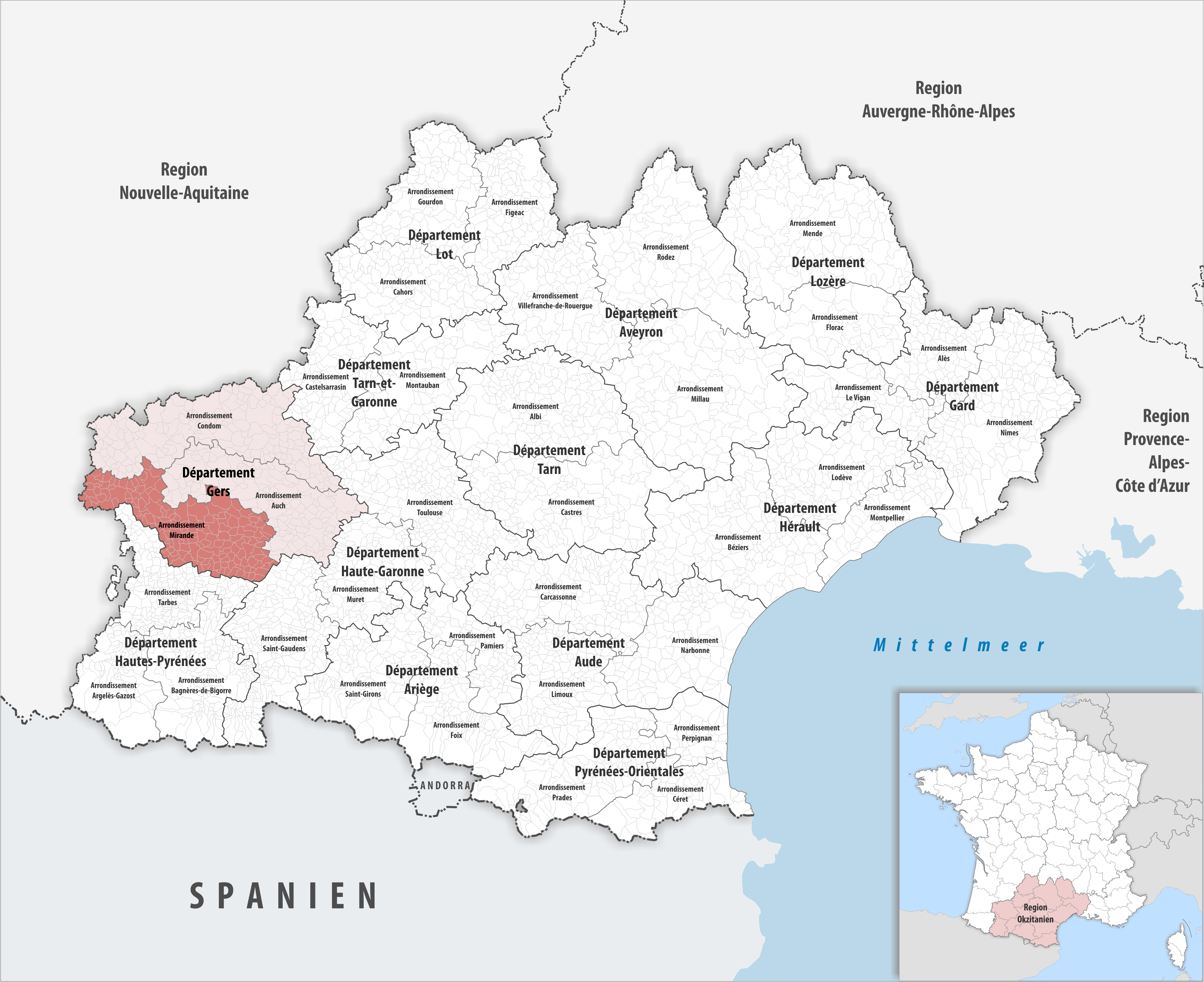 Lage des Arrondissements Mirande